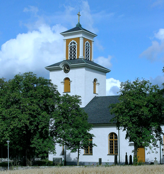 Gårdsby bei Växjö, Südschweden